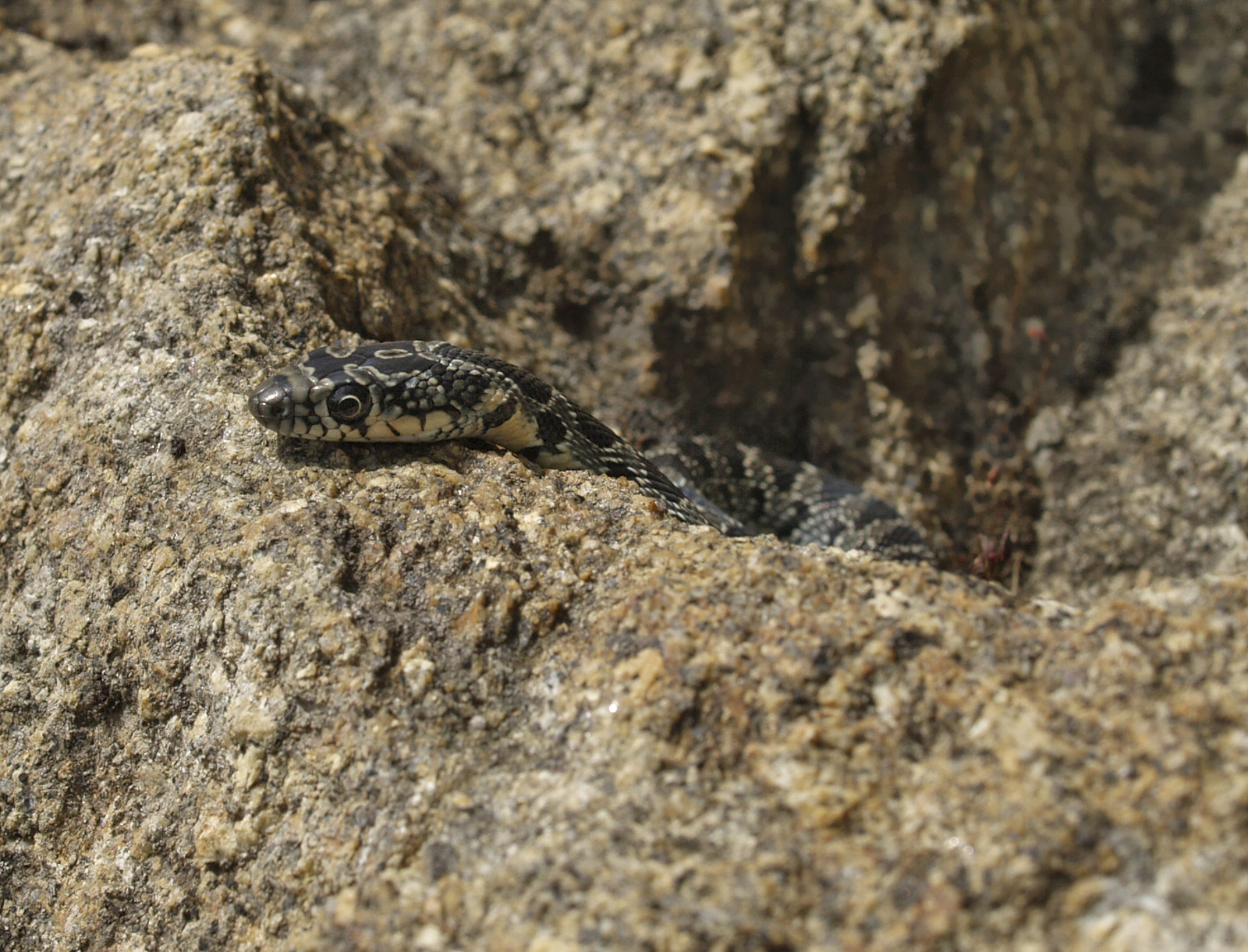 Culebra de herradura (Hemorrhois hippocrepis=Coluber hippocrepis), ejemplar juvenil. Madrigal de la Vera, Cáceres, España.